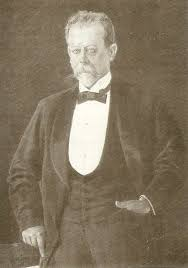 Fotografía de Ataliva Roca Paz tomada por Alejandro Luro.